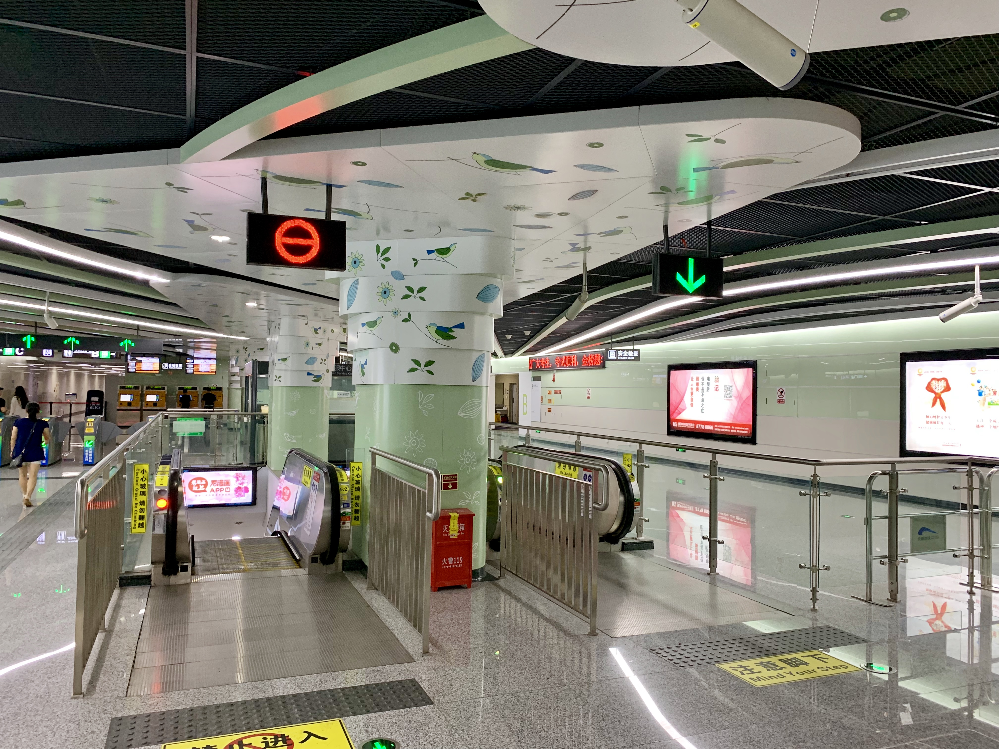 成都地铁红石公园站